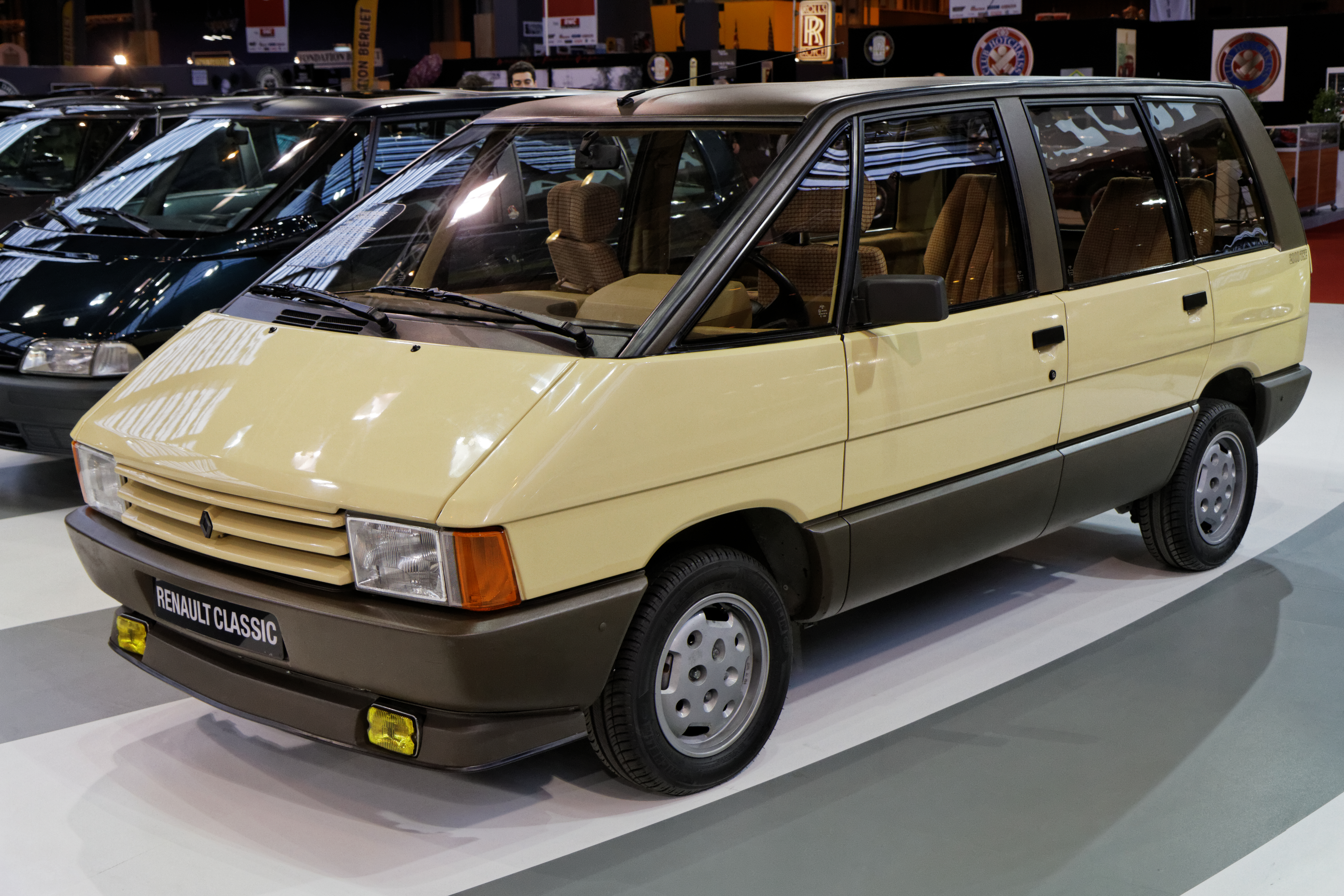 Une Renault Espace 2000 TSE présentée lors du salon Retromobile 2014.